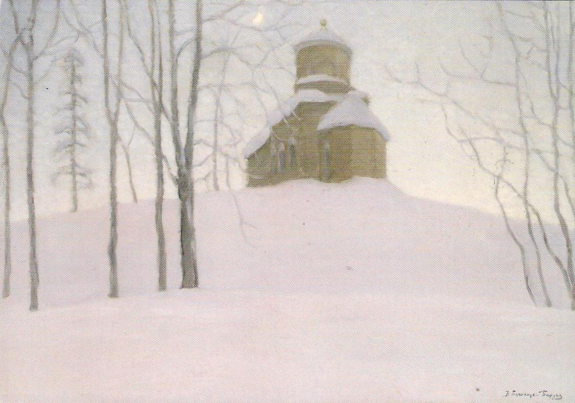 Балыницкий-Бируля Витольд Каэтанович (1872-1957). Зимний Сон. 1911. Холст, масло. 97 х 116 Национальный художественный музей Республики Беларусь